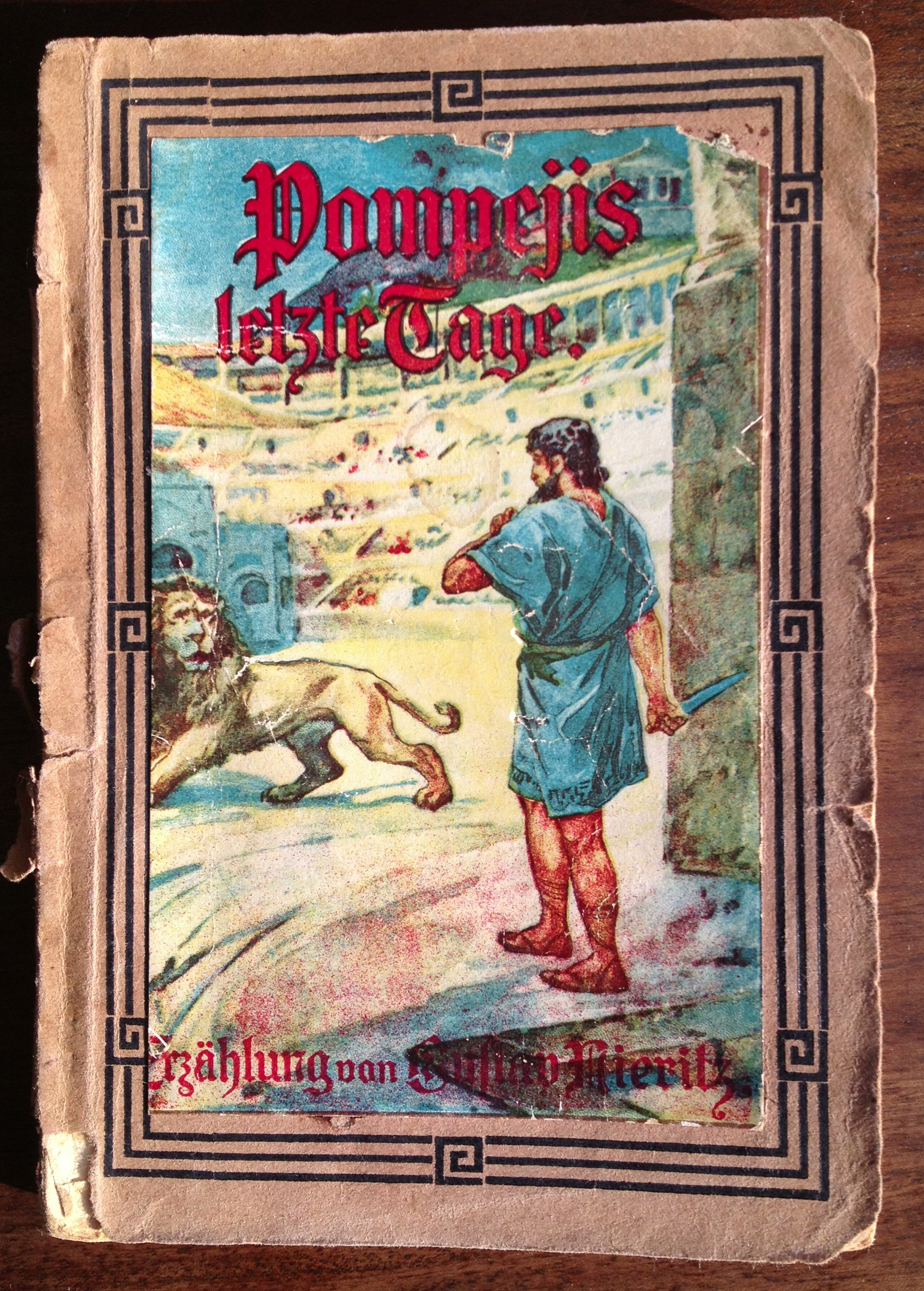 "Pompejis letzte Tage" von Gustav Nieritz, veröffentlicht 1850